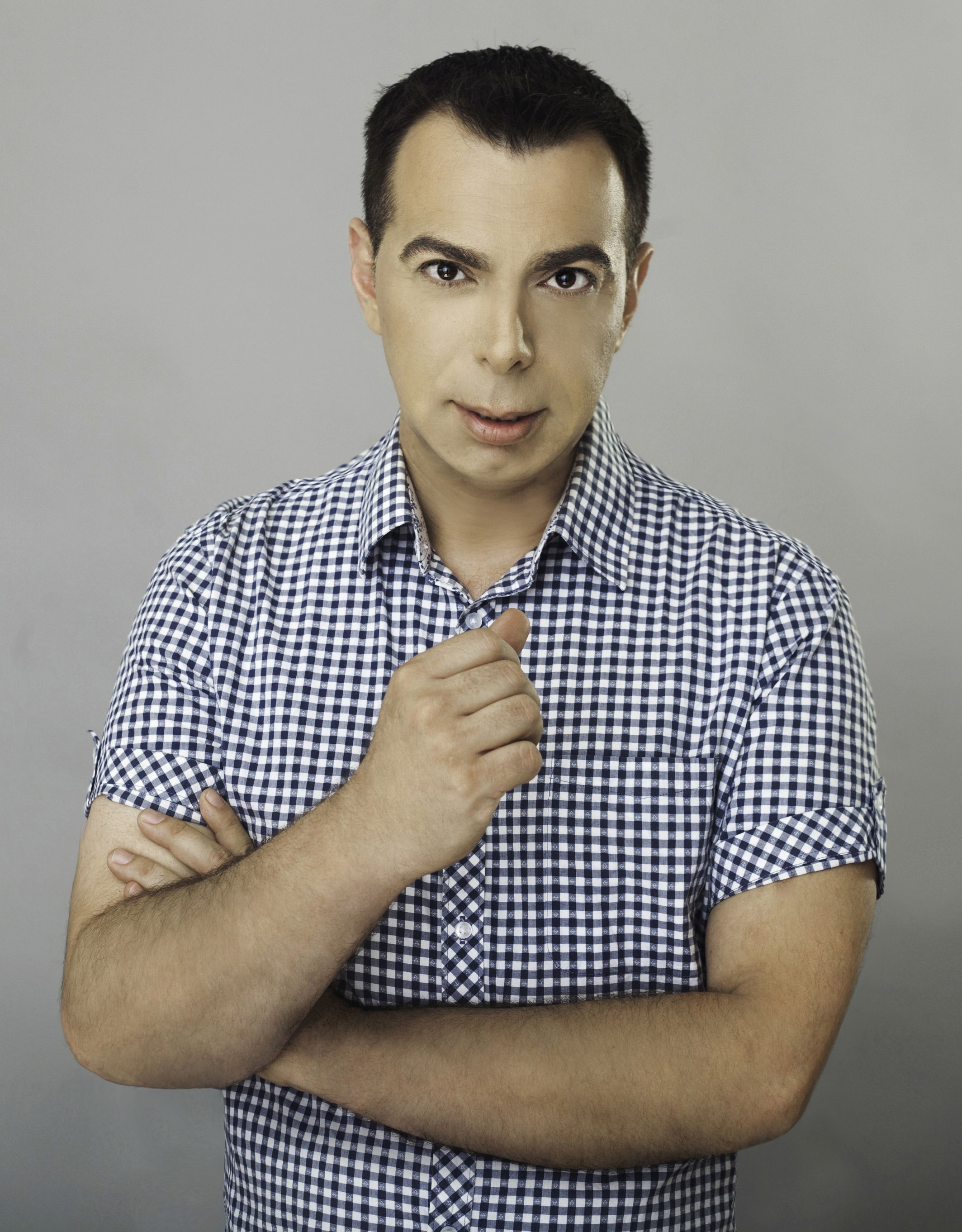 זיו כהן הוא סופר, עיתונאי ומוציא לאור ישראלי.